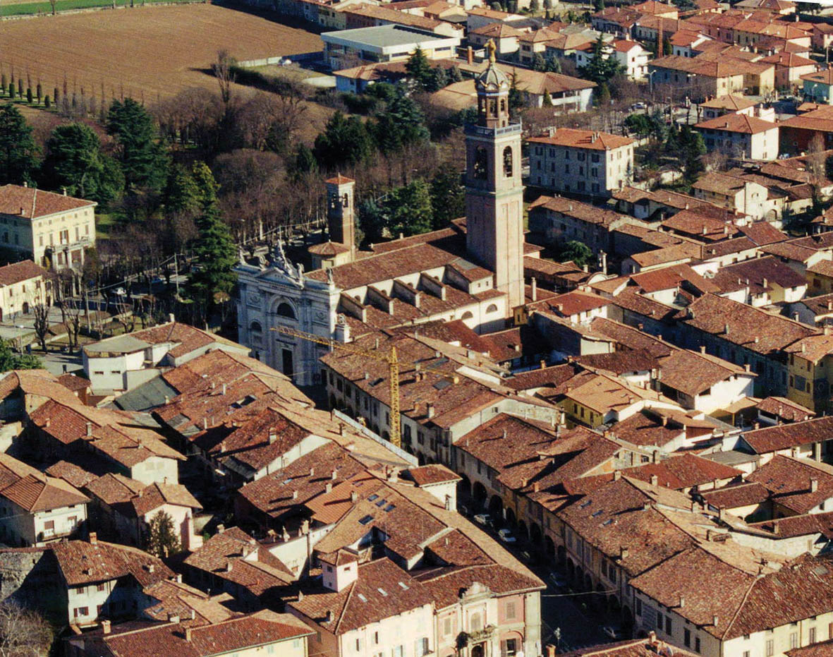 Panoramica centro storico Martinengo